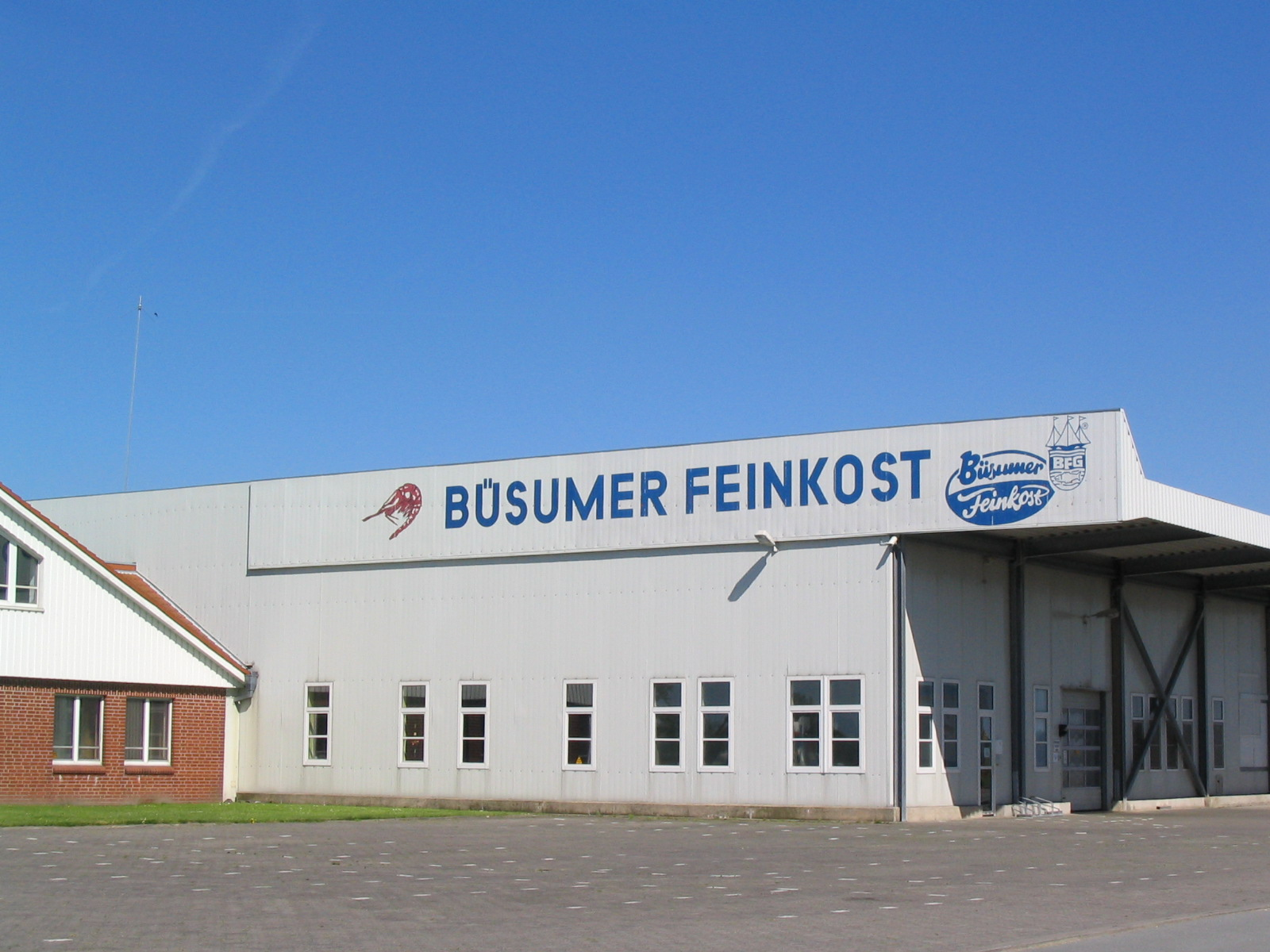 Economy in Wöhrden, Dithmarschen